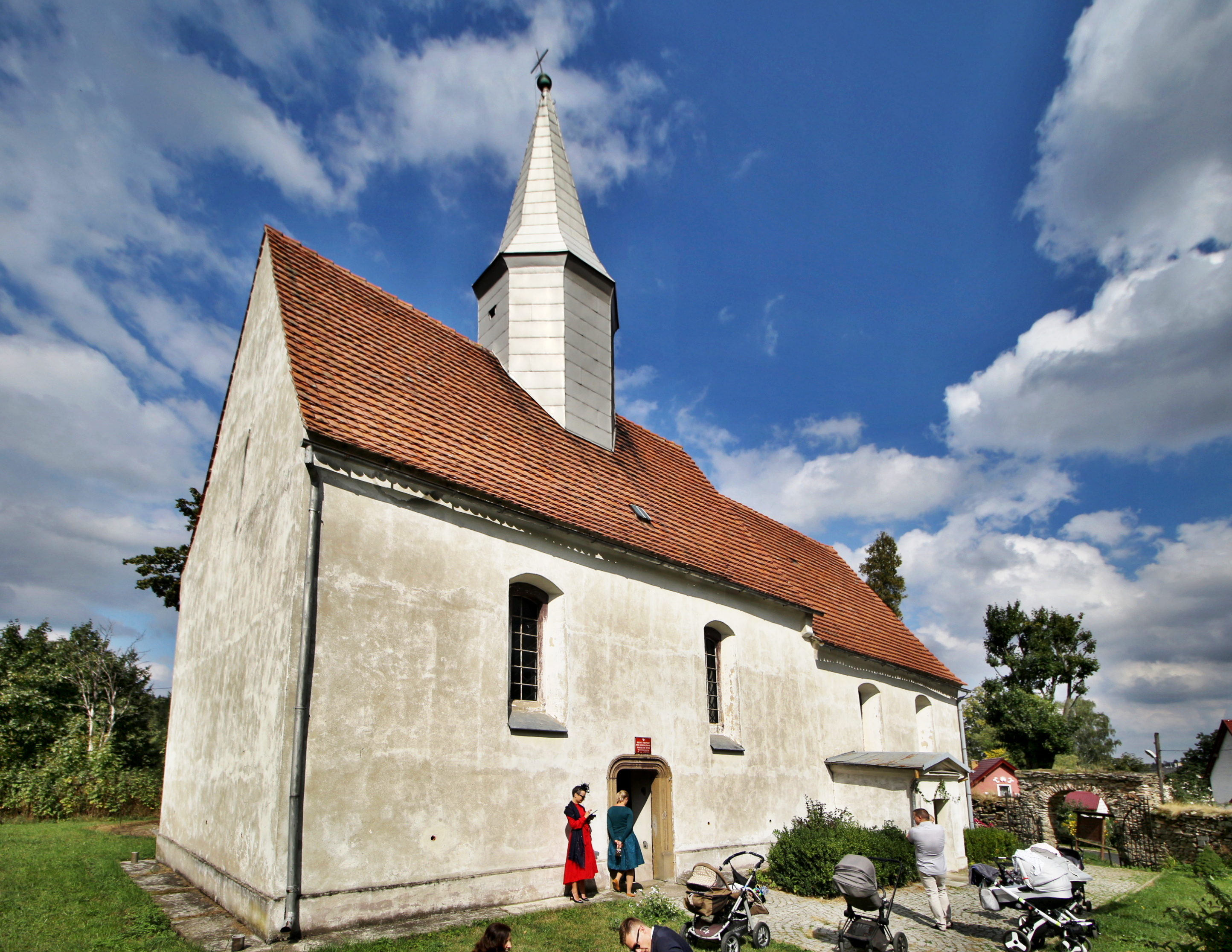 Kostel svatého Matěje ve Staré Białce